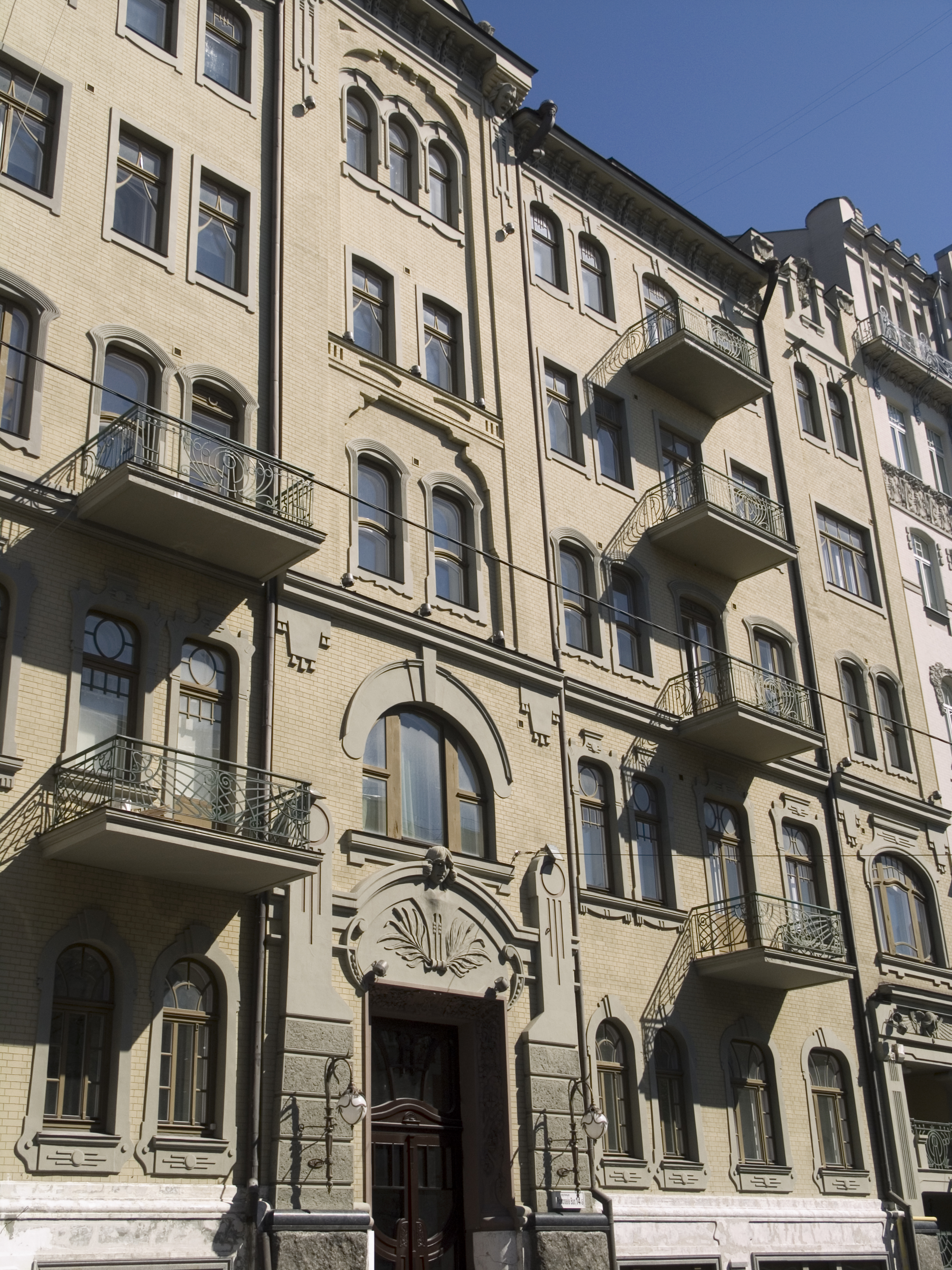 Україна, Київ - Ярославів Вал, 14б - Будинок прибутковий